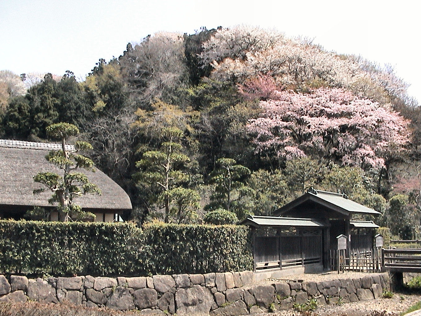 新林公園小池邸の春